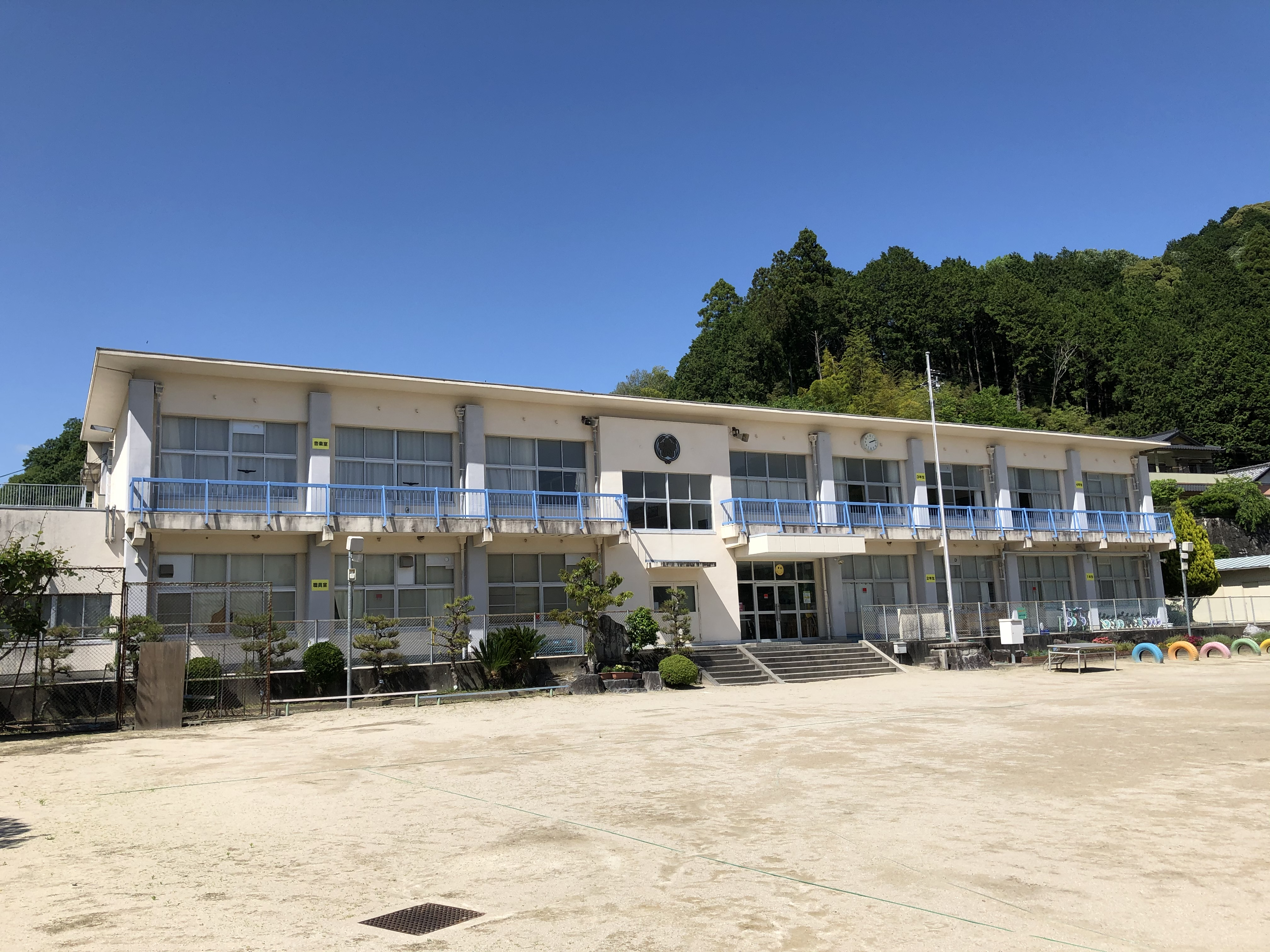 岡崎市立秦梨小学校（岡崎市秦梨町）